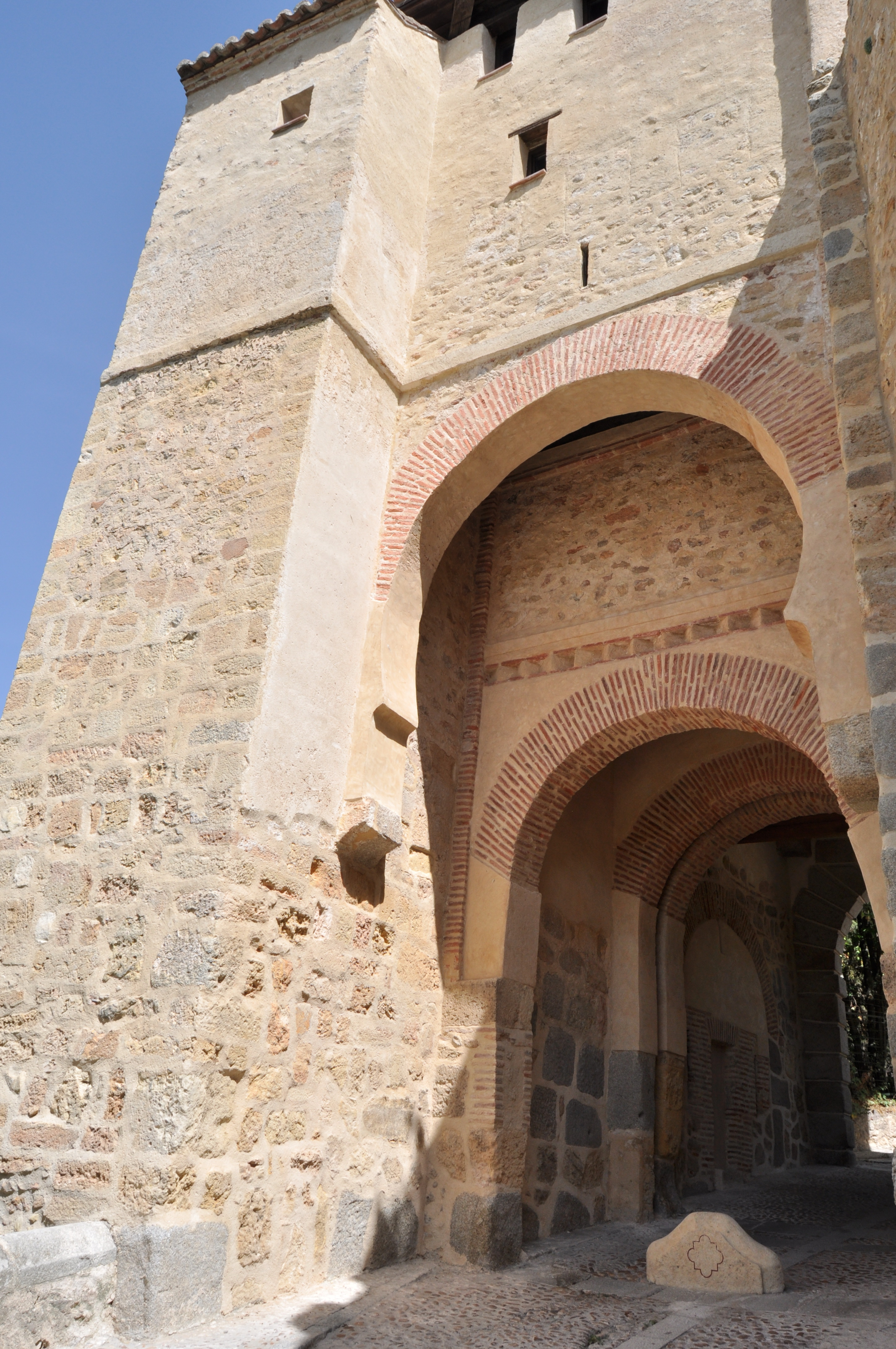 Segovia Capital - 088